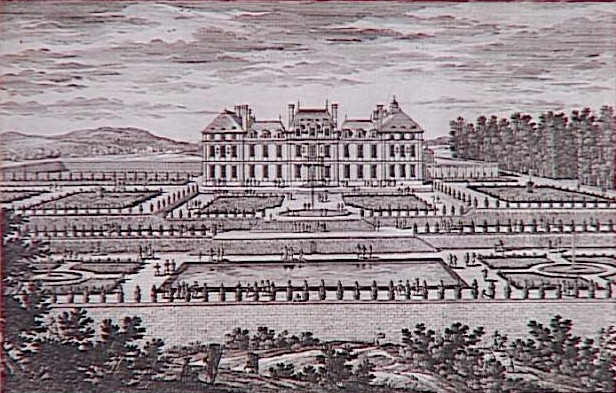 vue du château de Sceaux du côté des parterres dessinés par Le Nôtre Gravure d'Adam Perelle (1638-1695)